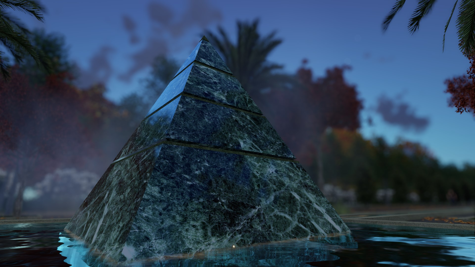 Escultura "Piràmide" Parc Can Sabaté - D.Navas, N.Solé, I.Jansana